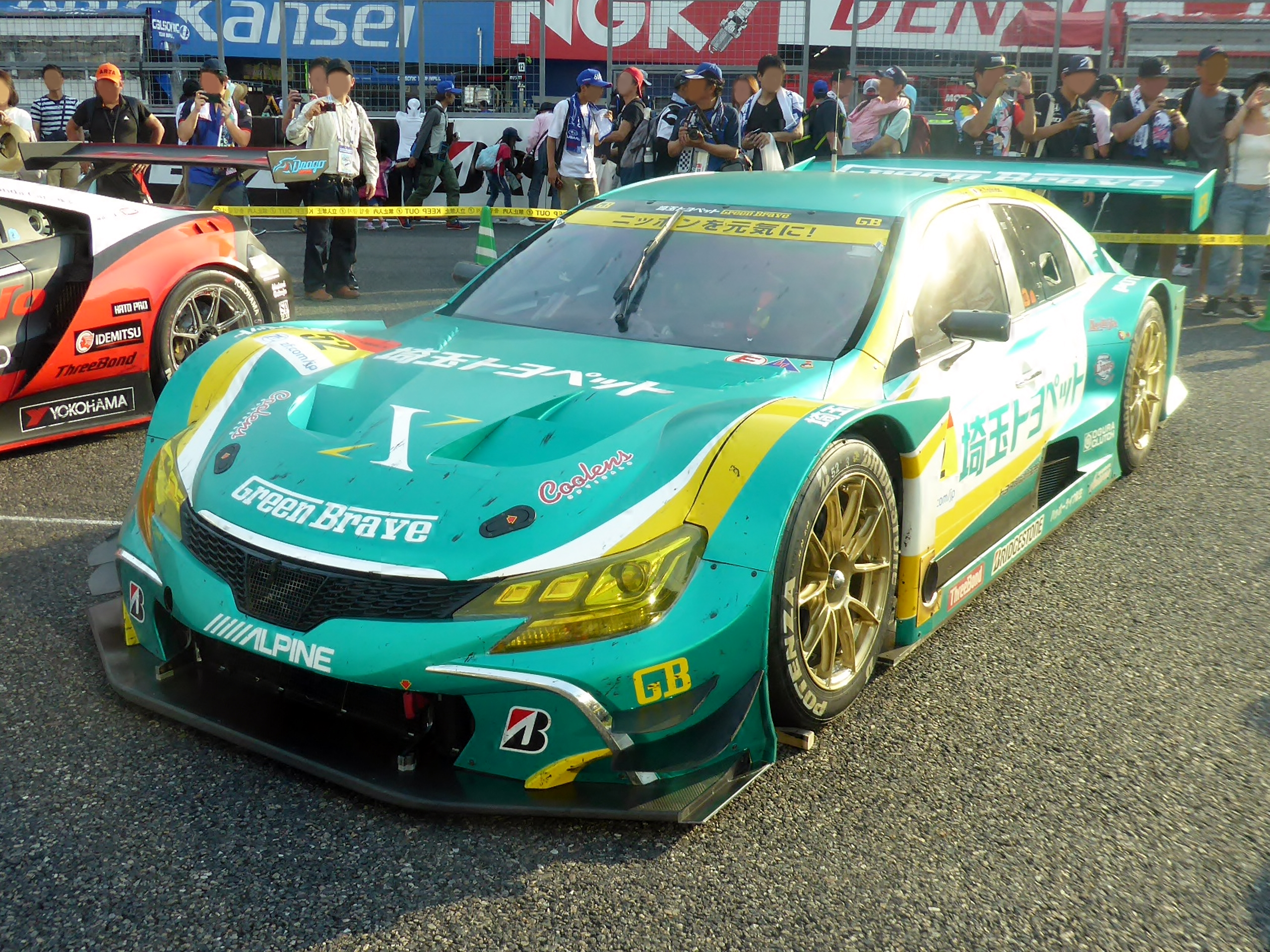 2019年鈴鹿GT300㎞終了後の52号車埼玉トヨペットGB マークX MCを撮影。